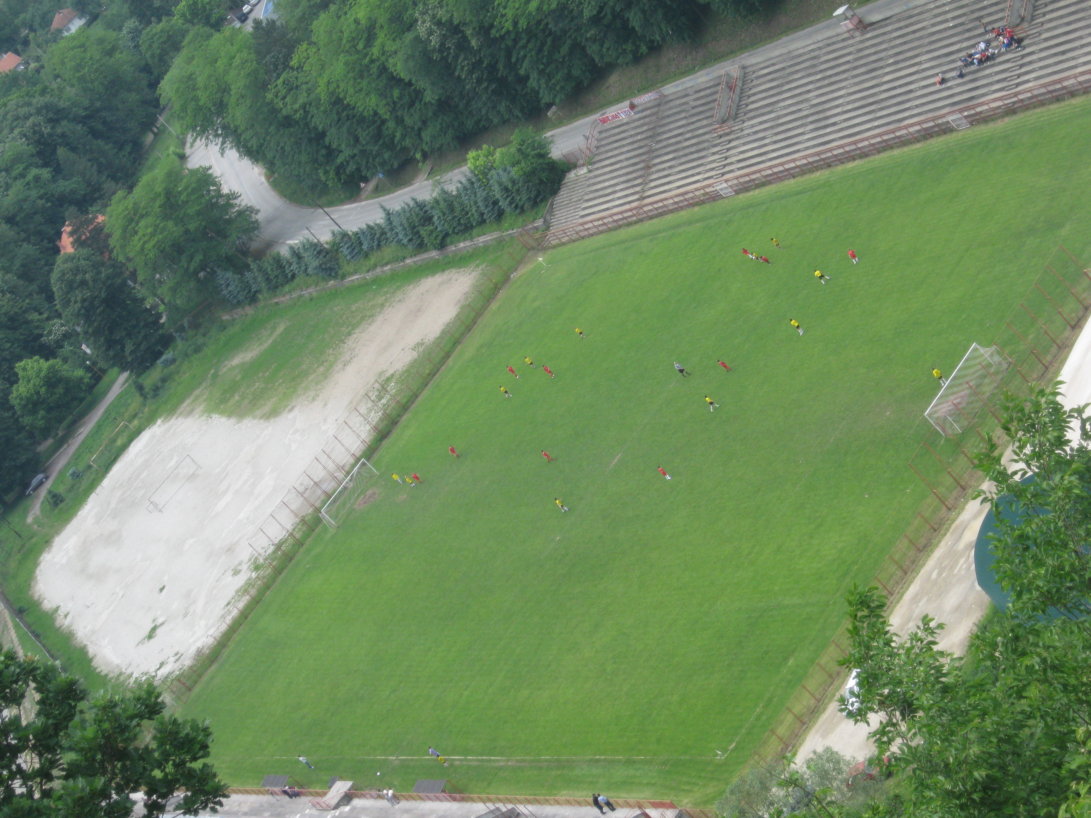 Стадион на Пећини